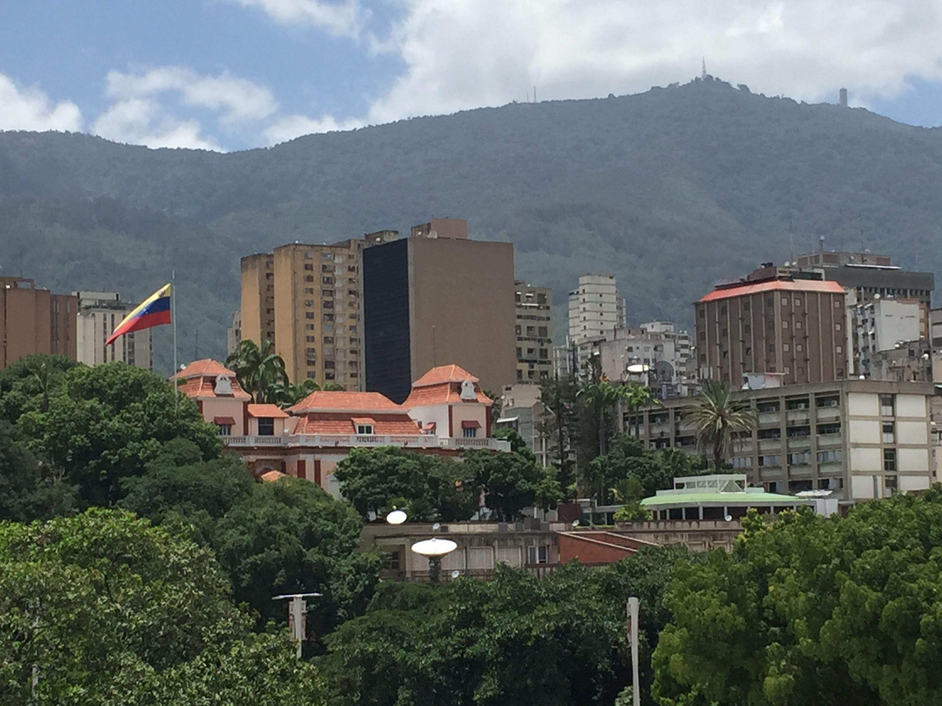 El Palacio de Miraflores desde El Calvario.